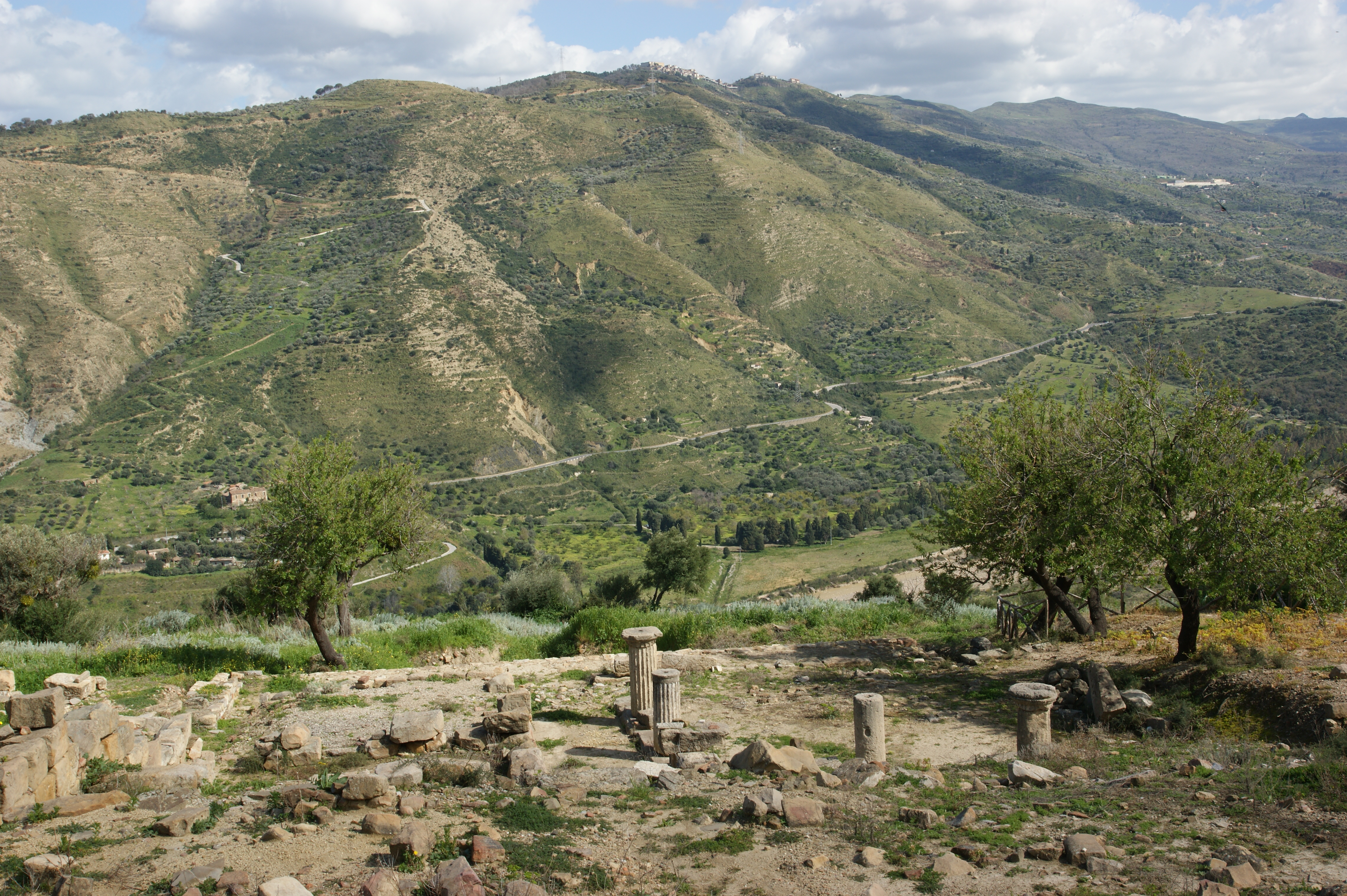 2009-03-22 03-29 Sizilien 438 Halaesa